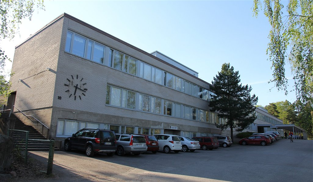 Kaivokselan koulu Vantaan Kaivokselan kaupunginosassa. Huom: Kuvan käyttö edellyttää lisenssiehtojen mukaisesti viittausta kuvaajaan.